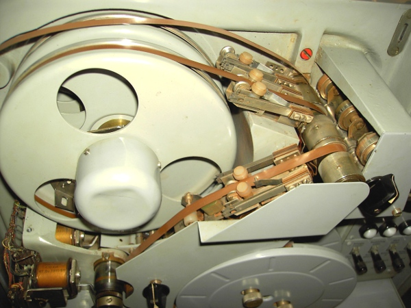 Zeitansagegerät aus einer Vermittlungsstelle mit Tonbändern.